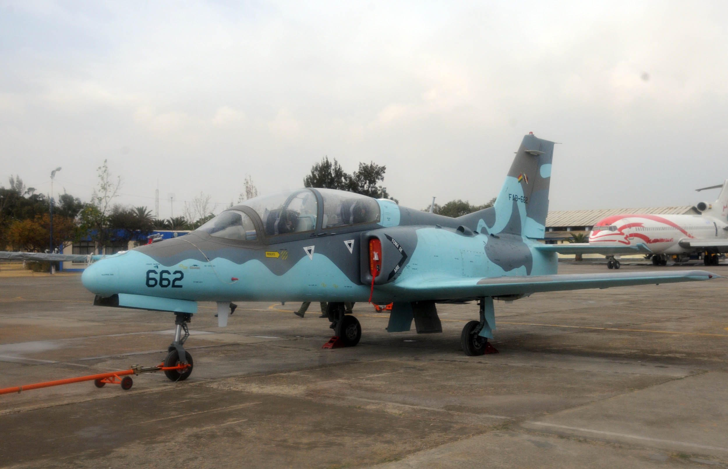 fotografia de la fuerza aerea de bolivia